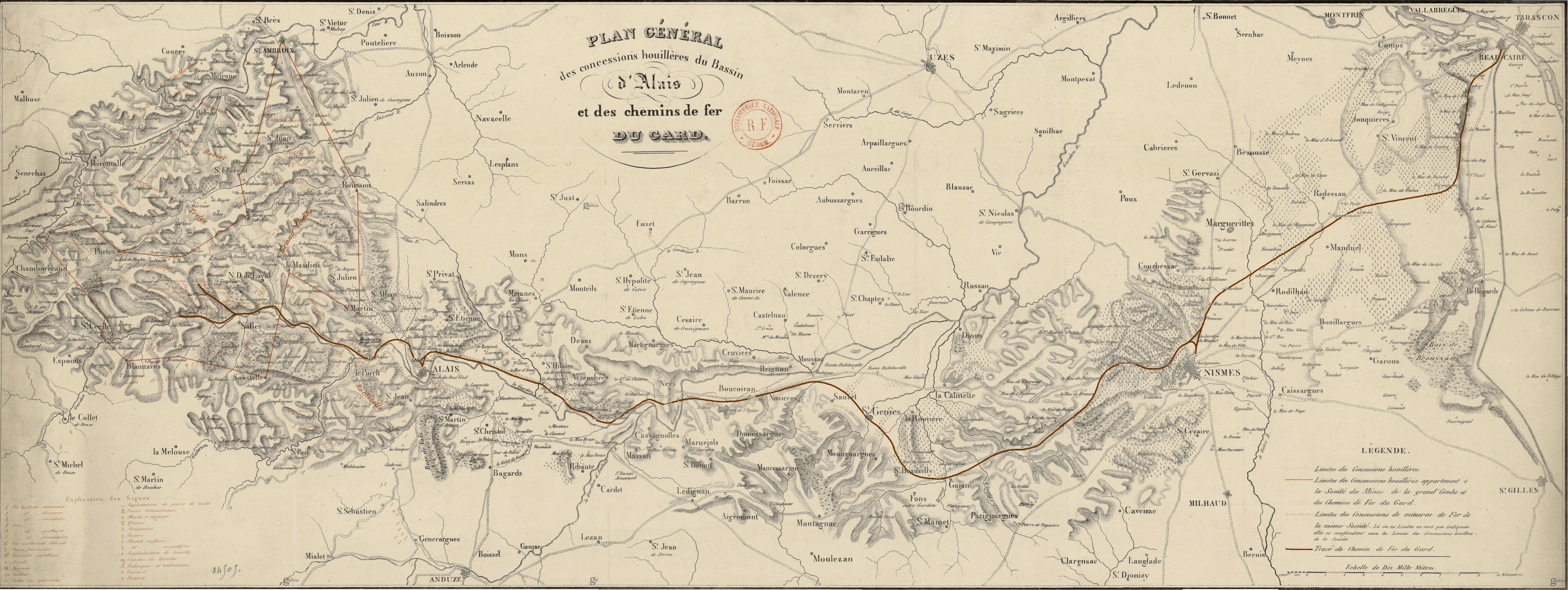 Titre : Plan général des concessions houillère du bassin d'Alais et des chemins de fer du Gard Éditeur : impr. de Thierry frères (Paris) Date d'édition : 18.. Sujet : Alès -- Bassin houiller Type : document cartographique,carte,image fixe Langue : Français Format : 1 bande ; 91 x 35 cm Format : image/jpeg Droits : domaine public Identifiant : ark:/12148/btv1b53060587d Source : Bibliothèque nationale de France, département Cartes et plans, GE C-3410 Relation : Couverture : France – Languedoc-Roussillon – Gard Provenance : bnf.fr Date de mise en ligne : 25/11/2013